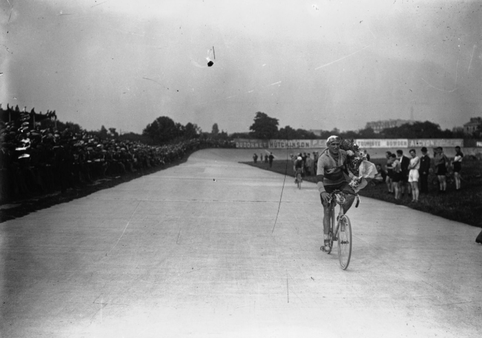 Jean Alavoine, vainqueur de la dernière étape du Tour de France au Parc des Princes, effectue un tour d'honneur, son bouquet à la main.